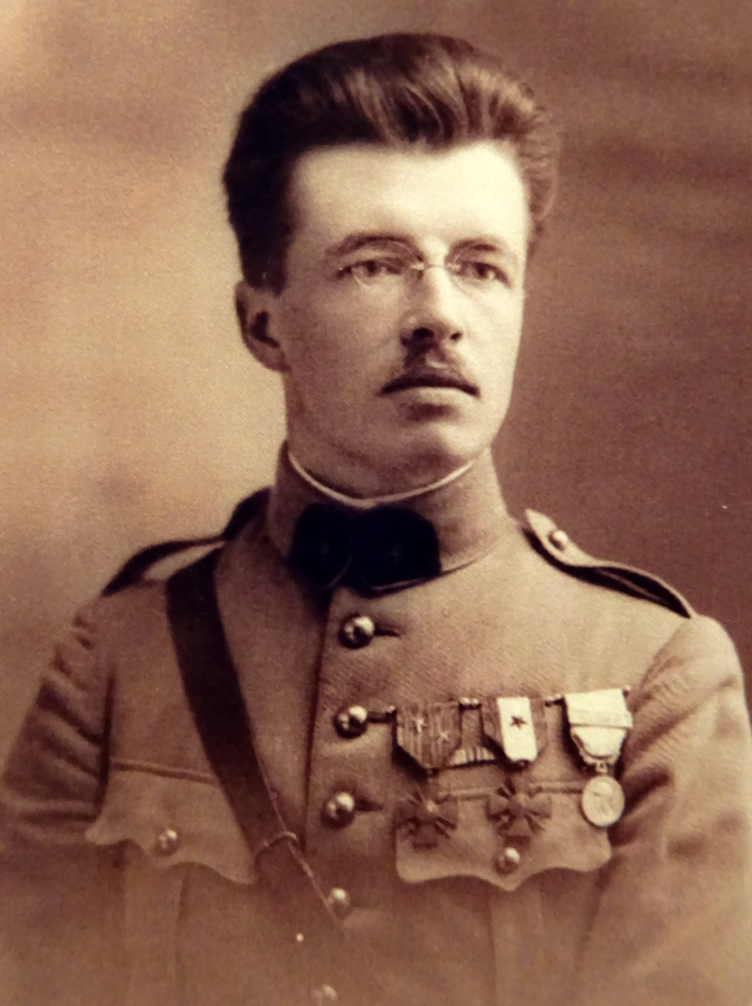 Lieutenant au 8ème Génie à Tours, en mai 1922